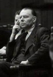 Koos Vorrink in 1951